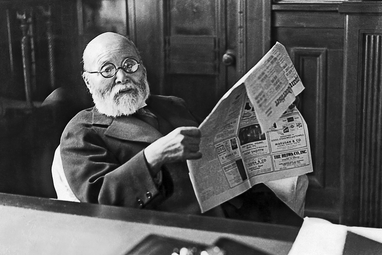 Korekiyo Takahashi / 高橋是淸, 1854–1936